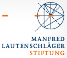 Manfred Lautenschläger-Stiftung Logo